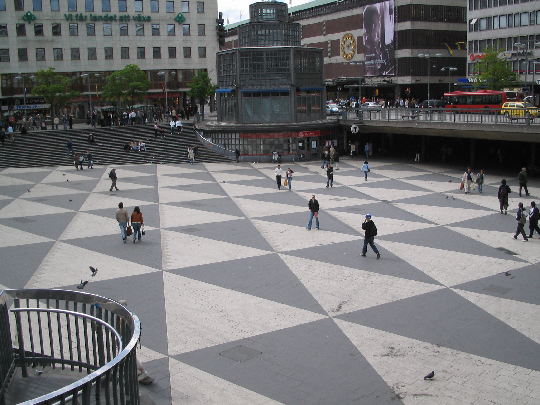 Sergels torg, Stockholm, Sweden